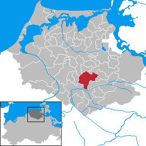 Gremersdorf-Buchholz in Mecklenburg-Vorpommern - District Nordvorpommern